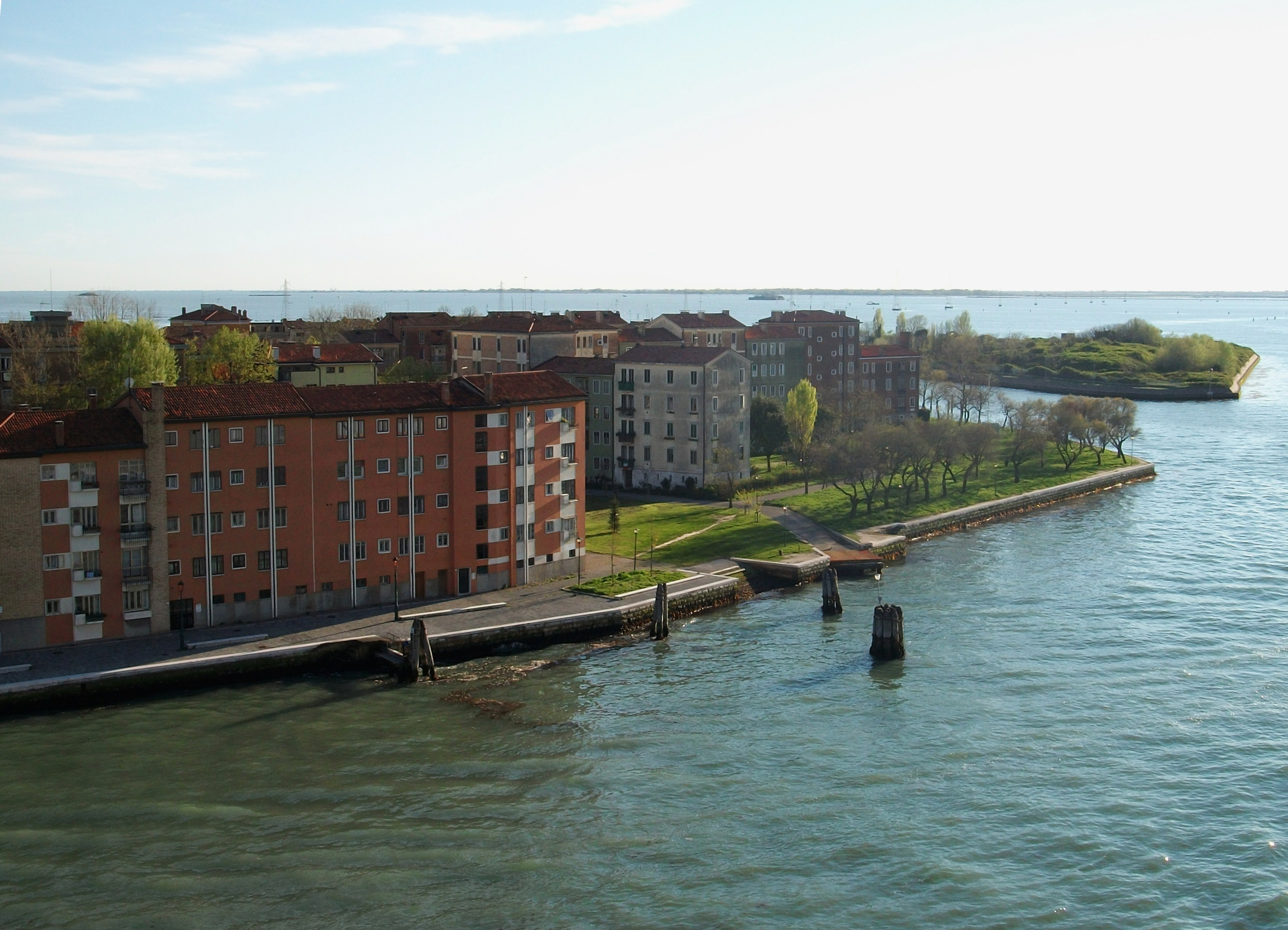 Sacca Fisola (Venècia).